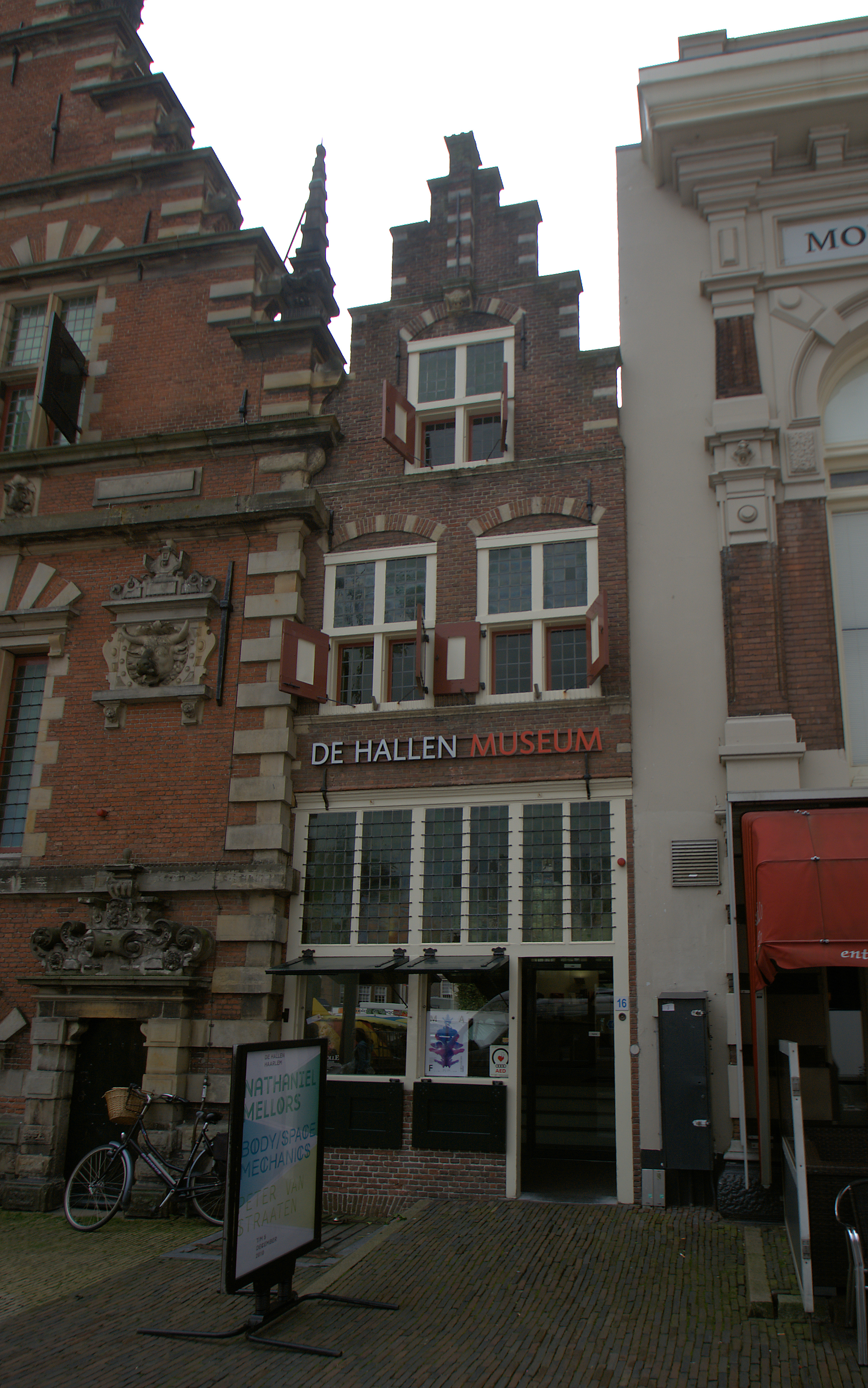 Haarlem - Grote Markt 16 - Vishuisje